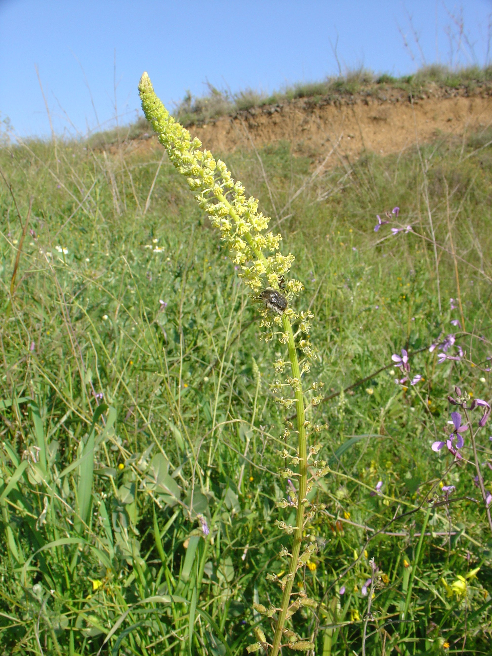 Reseda undata var. leucantha procedente de margen de camino en Sierra Minera, Murcia, Spain